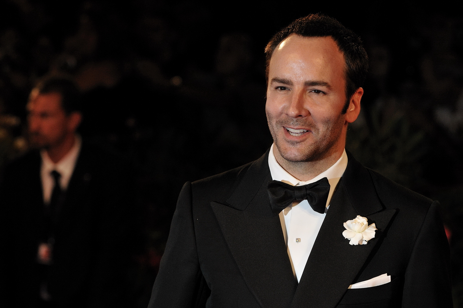 66ème Festival du Cinéma de Venise (Mostra), 10ème jour (11/09/2009) Tapis rouge avec Colin Firth, Julianne Moore, Matthew Goode et le réalisateur Tom Ford pour le film : A sigle Man